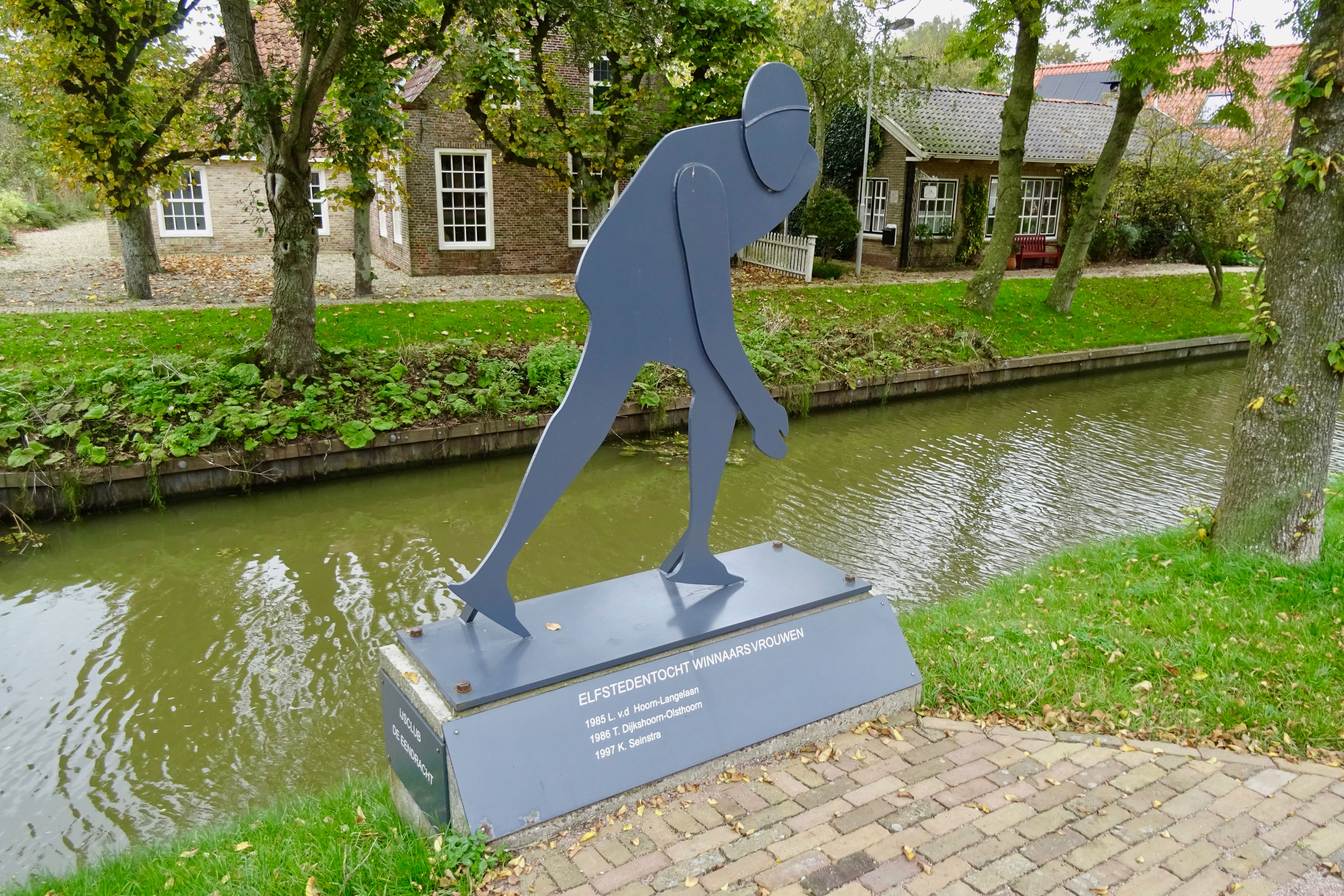 De Elfstedenrijdster (ook Us Klazien) in Alde Leie